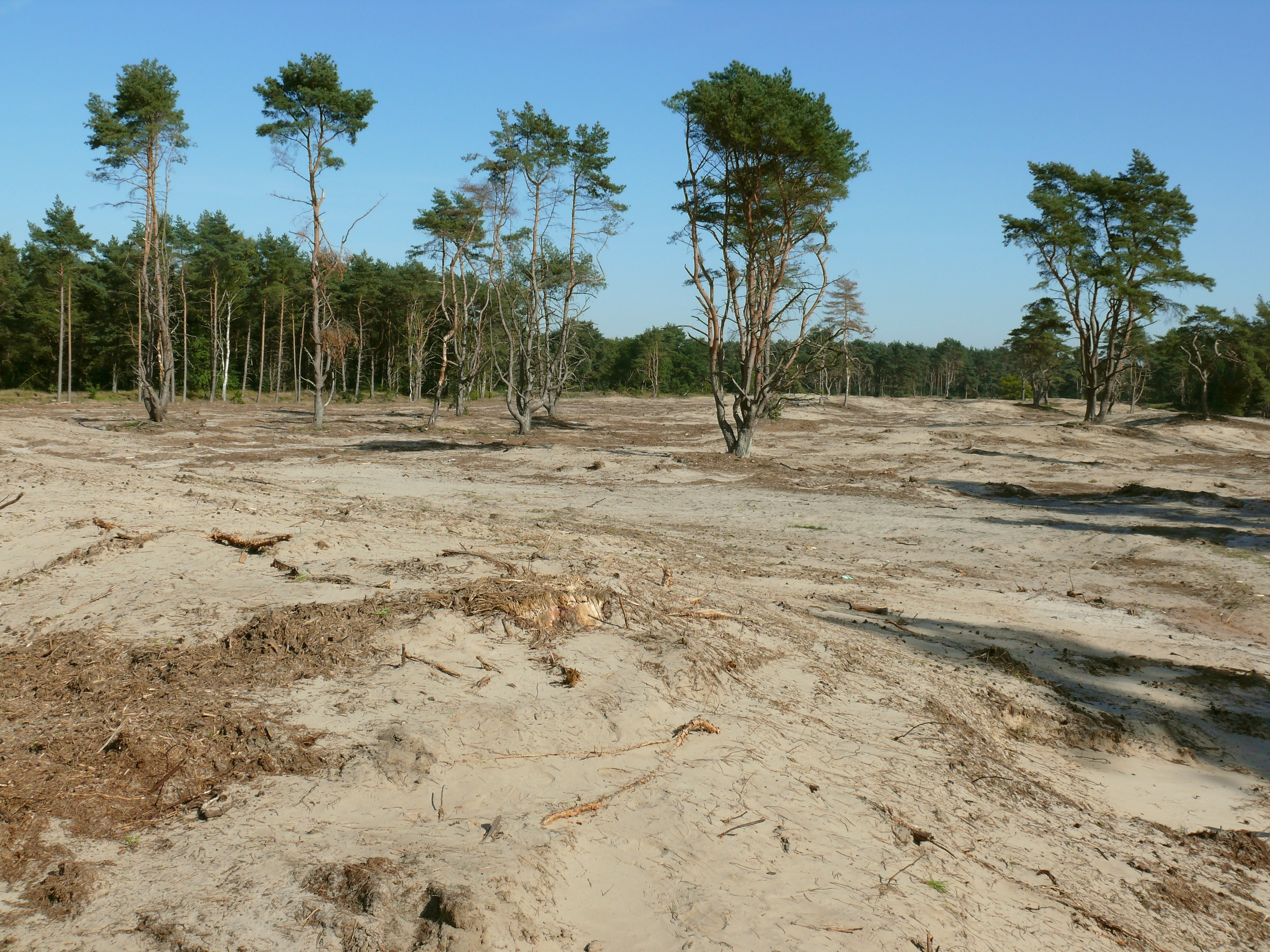 Holmer Sandberge kurz nach der Beseitigung der aufgelaufenen Vegetation